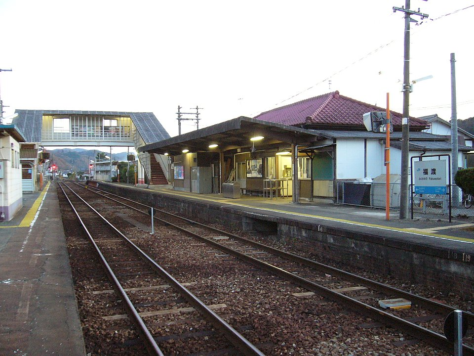 津山線福渡駅 構内を南望（撮影当時は御津郡建部町）